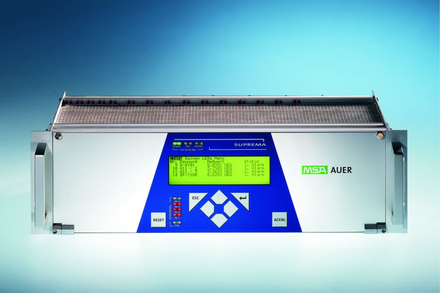 Gaswaranlage Suprema